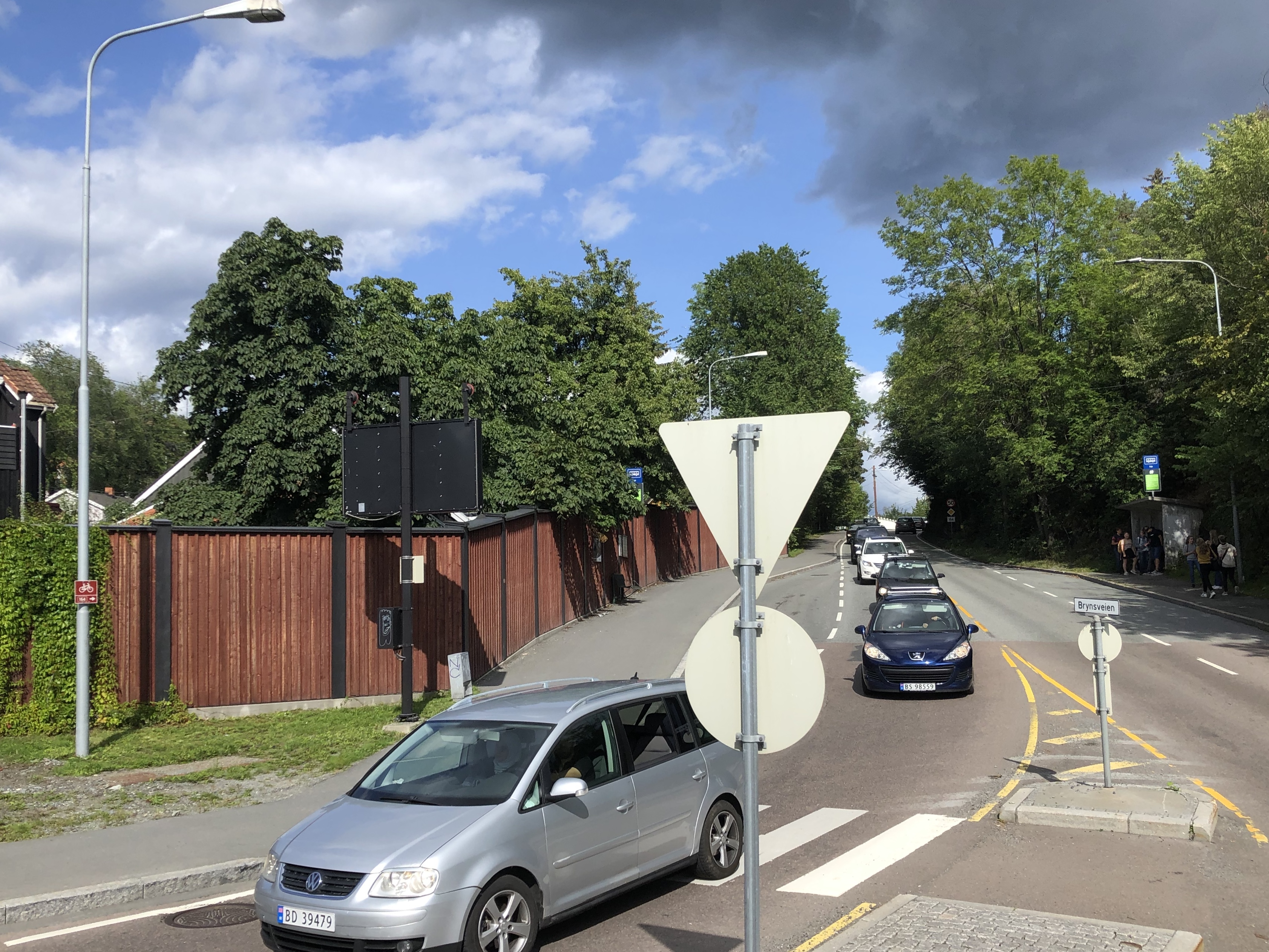 Brynsveien, Sandvika